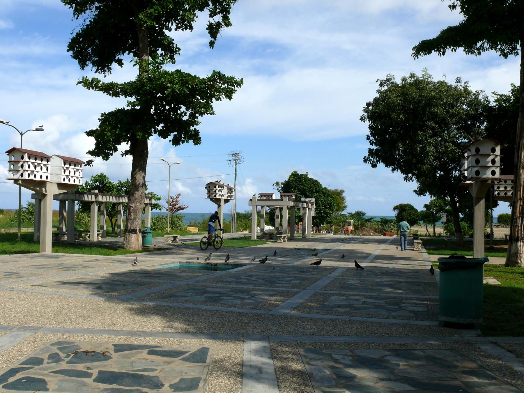 Desde el Parque Las Palomas